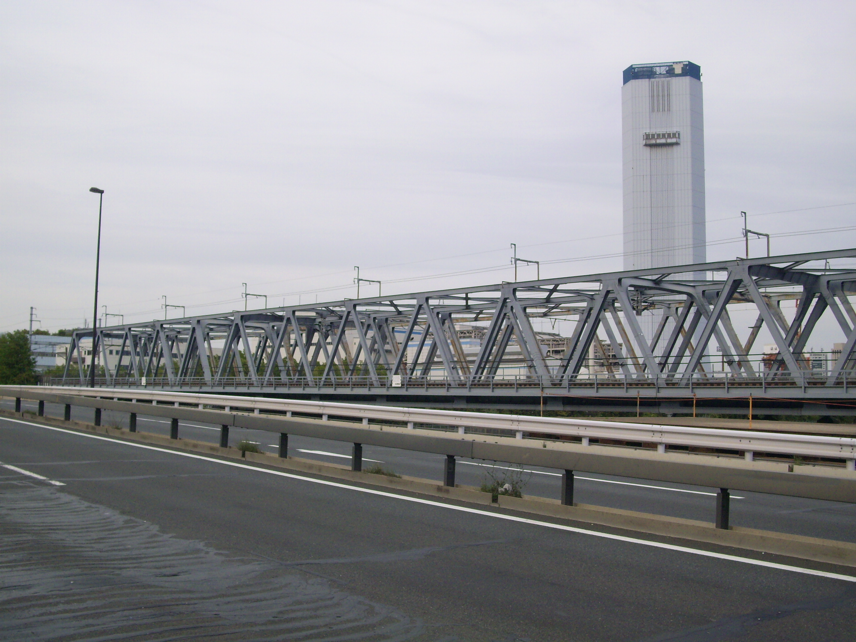 東海道新幹線大井車両基地引き込み線：若潮橋梁 ㊟カメラを起動すると日付機能が出荷時のものに初期化されるため、ファイル履歴の撮影日時とメタデータの原画像データの生成日時が異なります